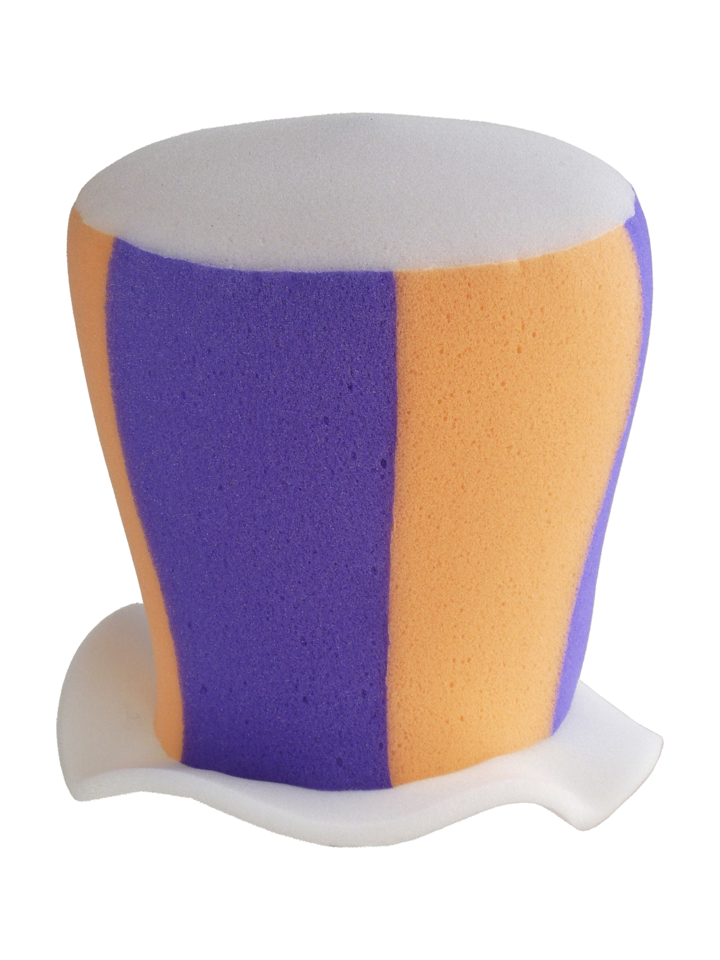 Un sombrero de copa (galera o chistera) confeccionado con esponja de colores para ser usado en fiestas.